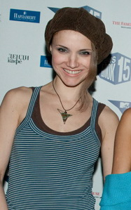 Ирина Тонева на на праздновании 15-летия программы News Блок на MTV Россия (2011 год)